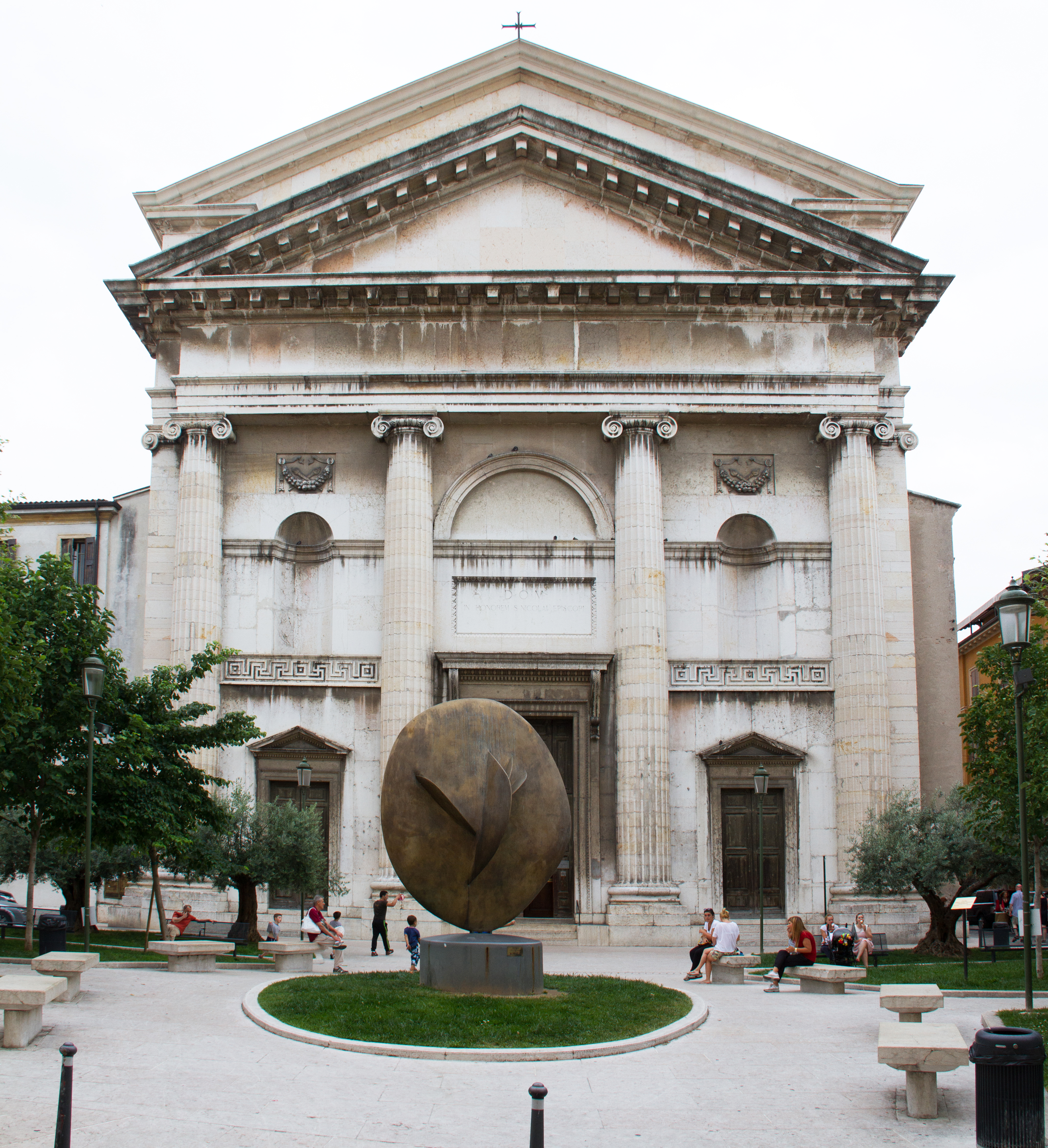 Piazza San Nicolò